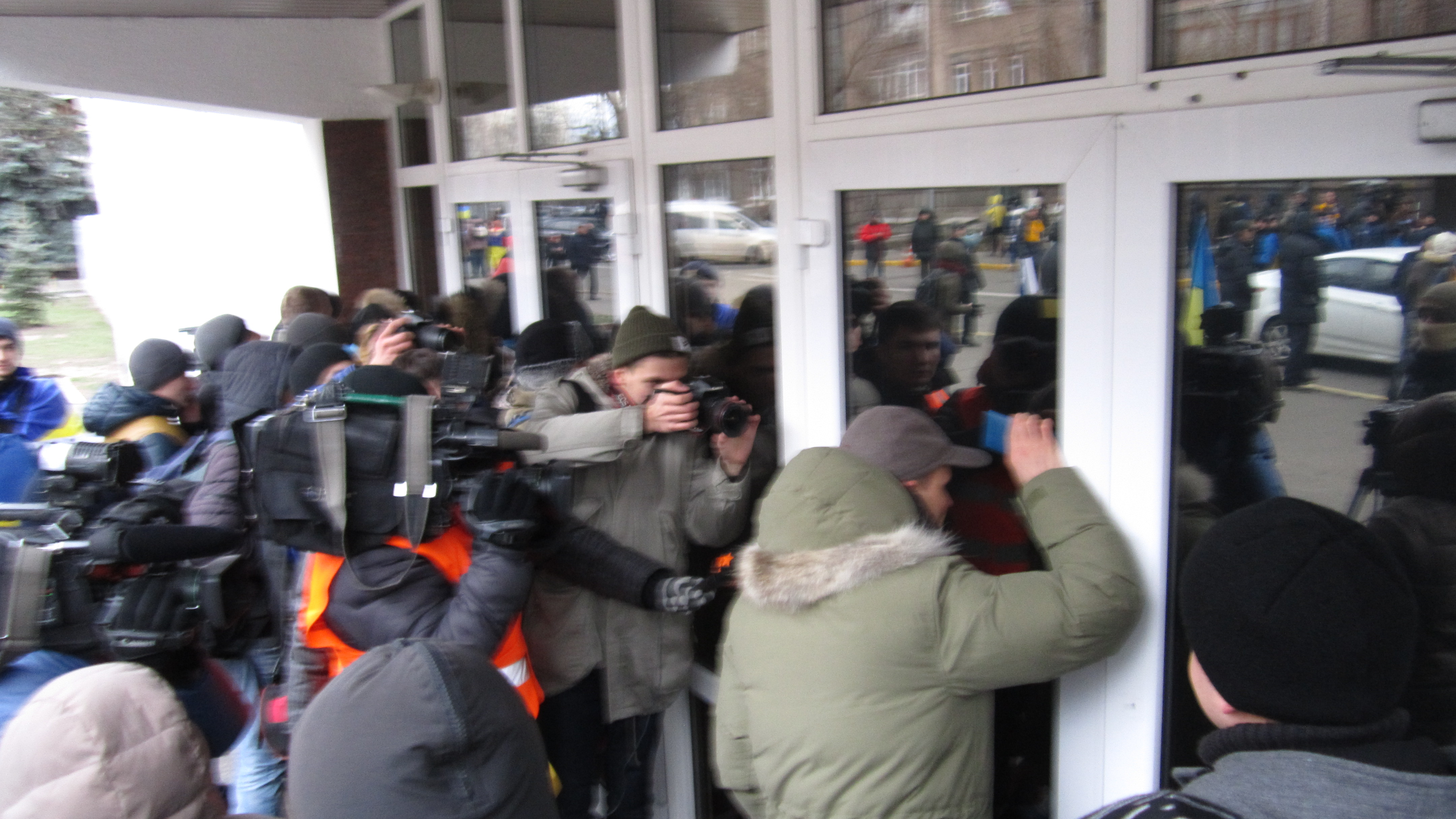 Народний депутат України Юрій Дерев'янко показує своє посвідчення крізь затемнене скло парадних дверей Міністерства внутрішніх справ України. Парламентаря оточують представники мас-медій. Двері замкнені, ручки з дверей завчасно відкручені. У холі будівлі стоять правоохоронці.